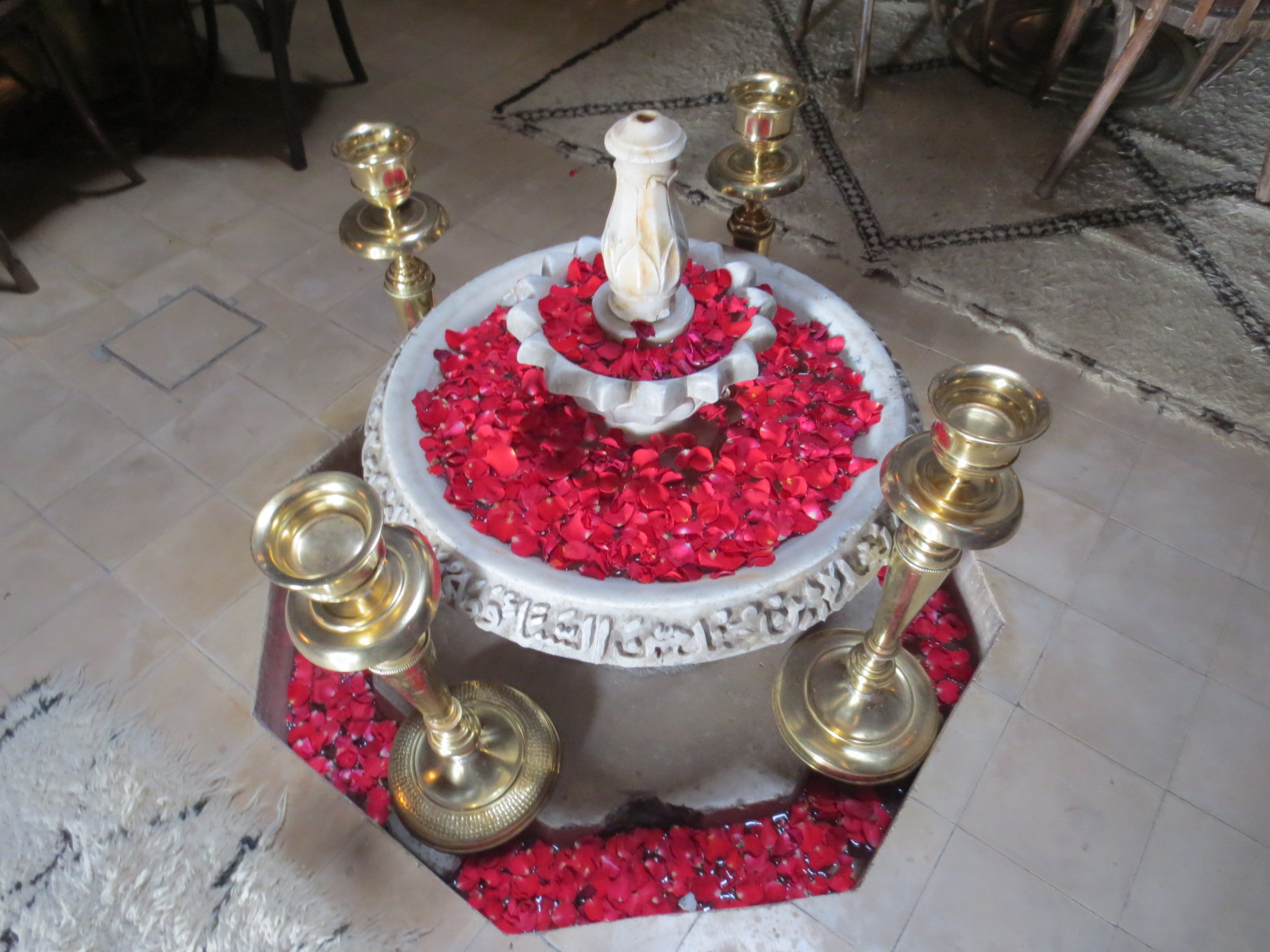 Riad au Maroc